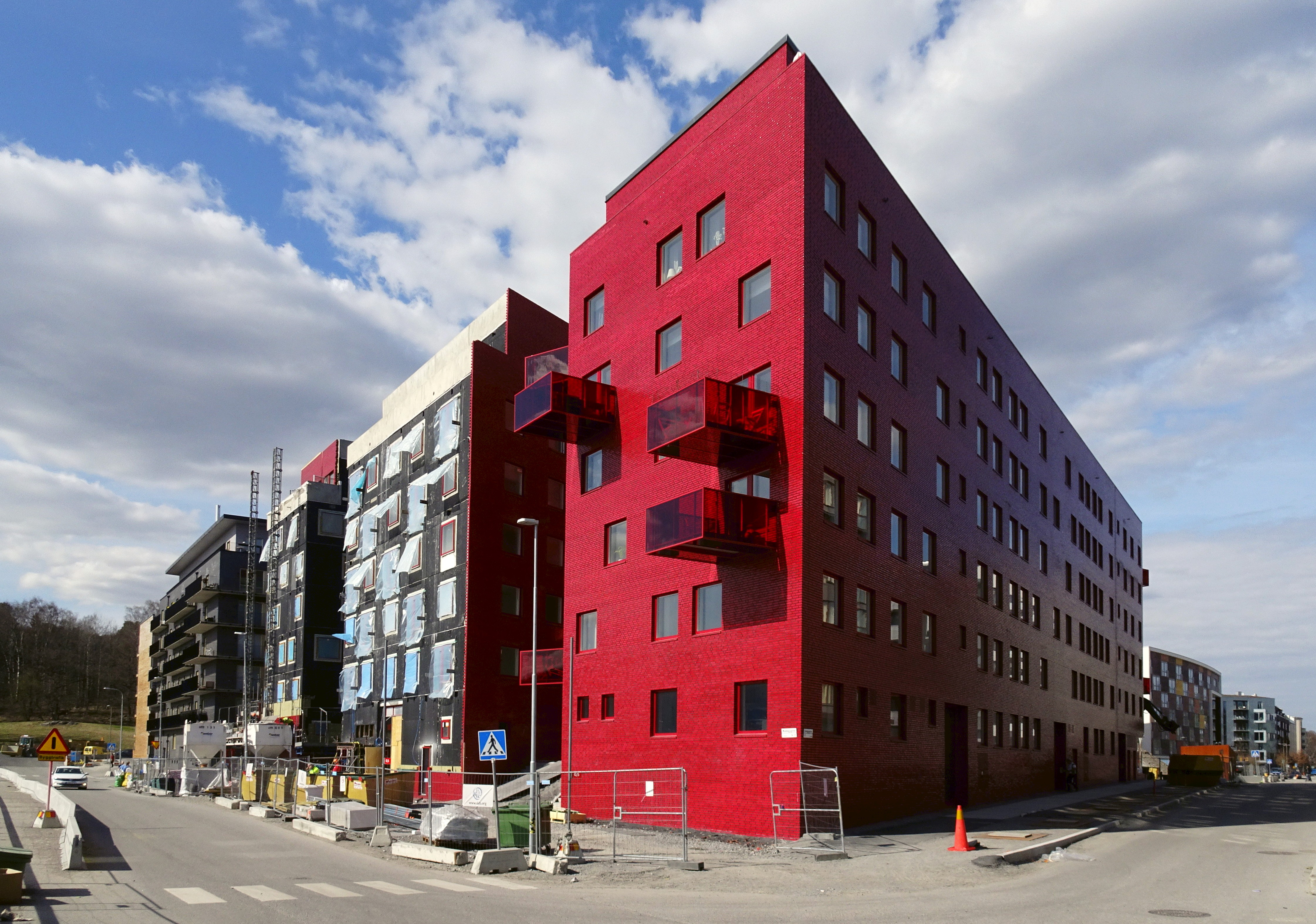 Kvarteret Muddus, Norra Djurgårdsstaden, arkitekt Wingårdh